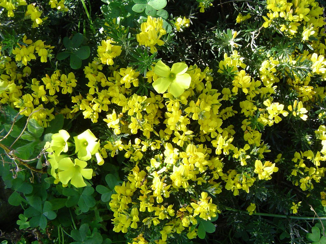 Teline linifolia, Ceuta, NW de África, España. También se ven flores de Oxalis pes-caprae